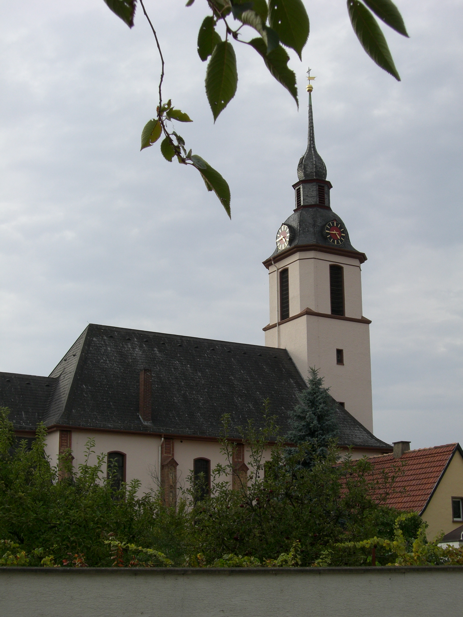 Protestantische Kirche in Römerberg-mechtersheim, erbaut 1949-52